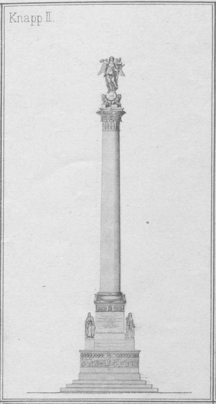 Johann Michael von Knapp: Entwurf für die Jubiläumssäule in Stuttgart, Zeichnung, 1842. Albert Eugen Adam; Karl Leibbrand: Die Jubiläumssäule in Stuttgart, Stuttgart 1893, Ausklapptafel nach Seite 10. Johann Michael Knapp, 1791-1861